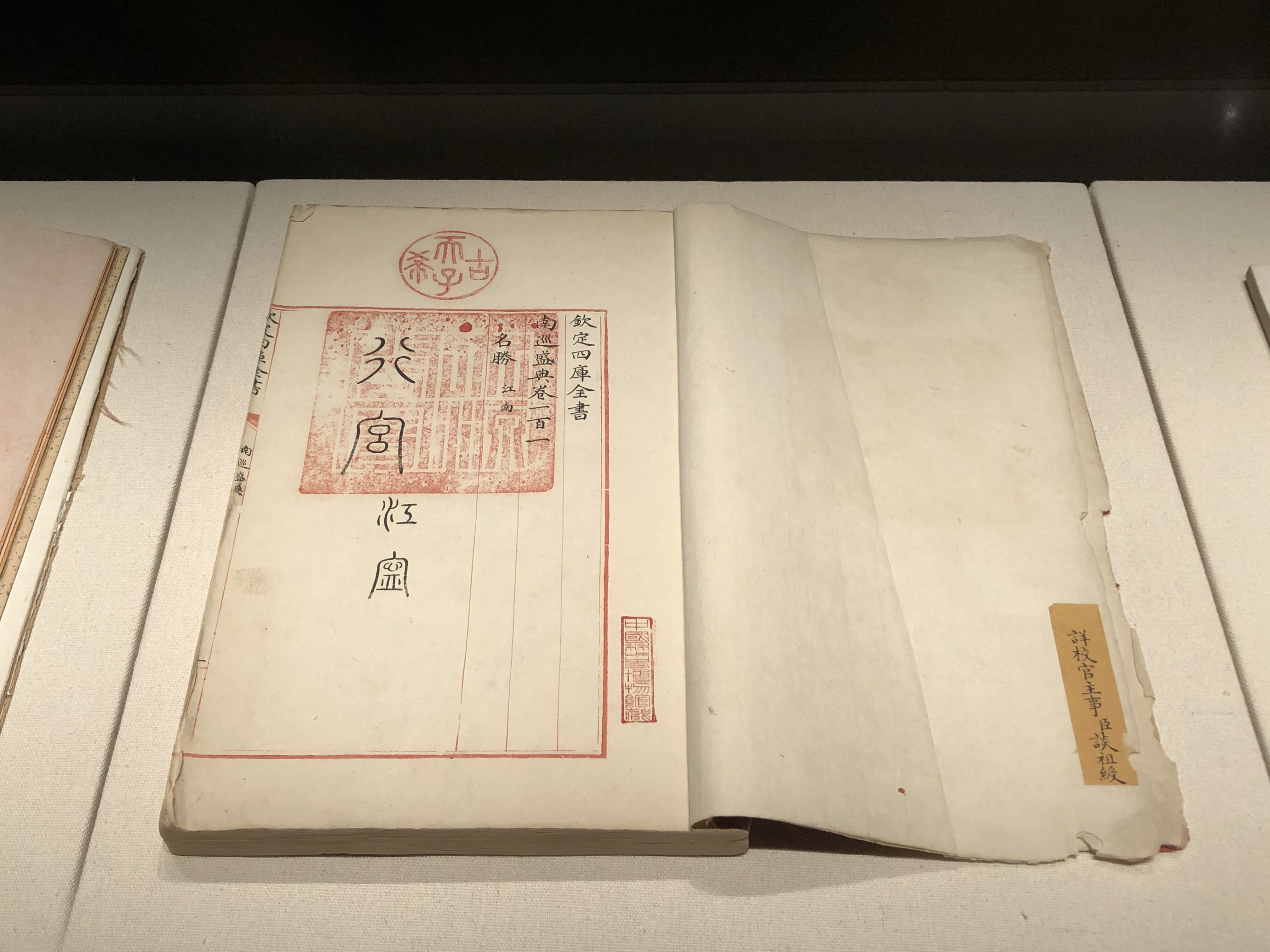 中文（台灣）: 文源閣四庫全書